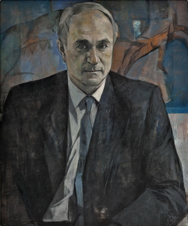 Martín Almagro Gorbea. Número de inventario: 2001-4-2134.